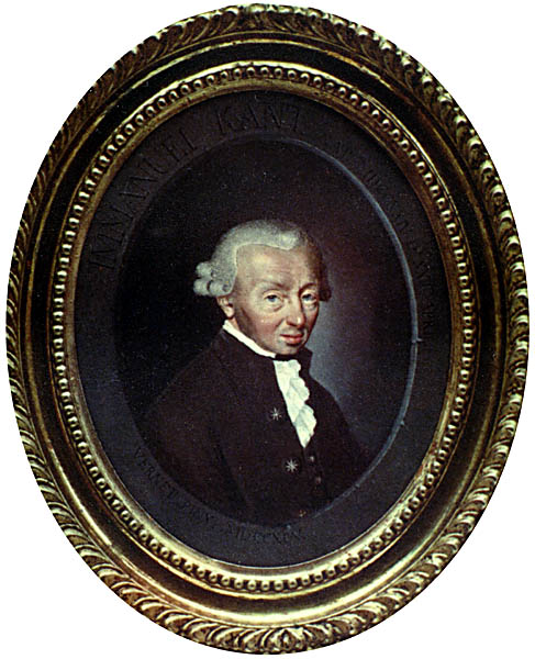 Kant von Carle Vernet (1758-1836) Größe: 8:10,5 cm. Nach einem Porträt von 1792. Berlin, Kaiser-Friedrich-Museum